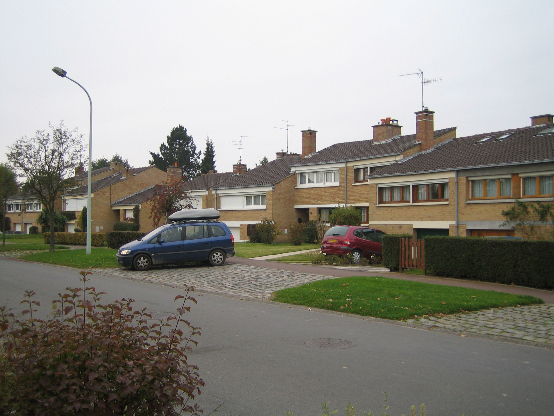 Rue du Moulin d'Ascq, Villeneuve d'Ascq